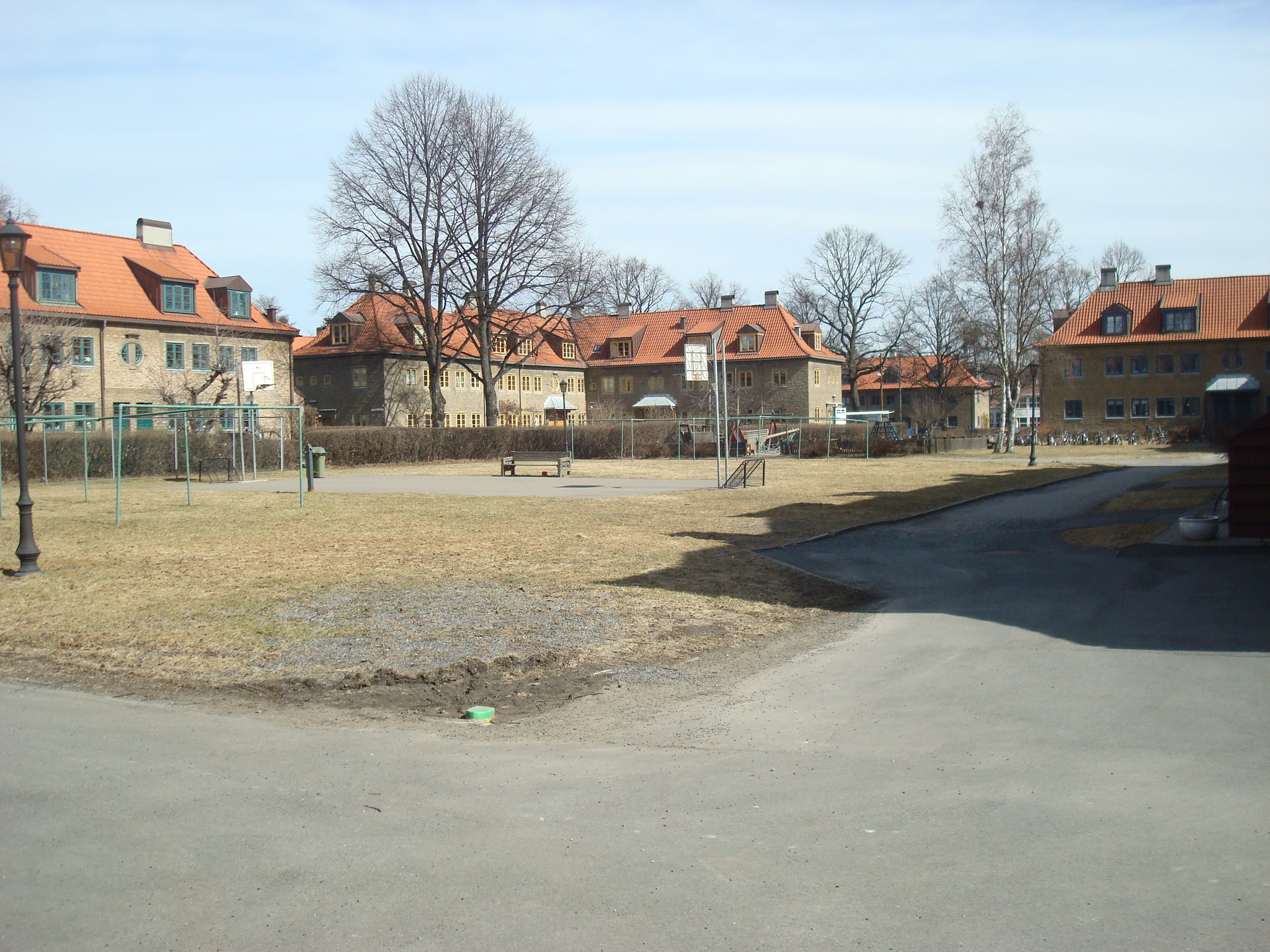 Lille Tøyen hageby (april 2013).